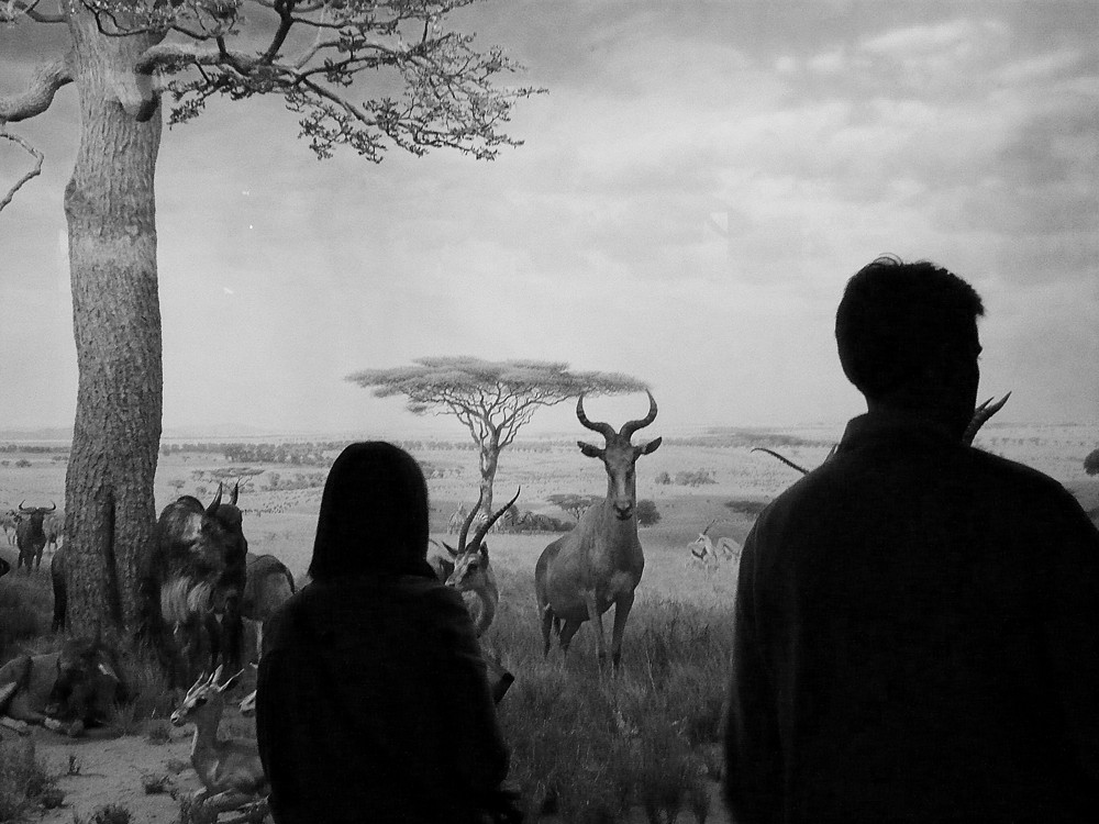 Natural History Artistic Research/Natural History Künstlerische Forschung, study scene/Studienszene, 1999, Ruediger John